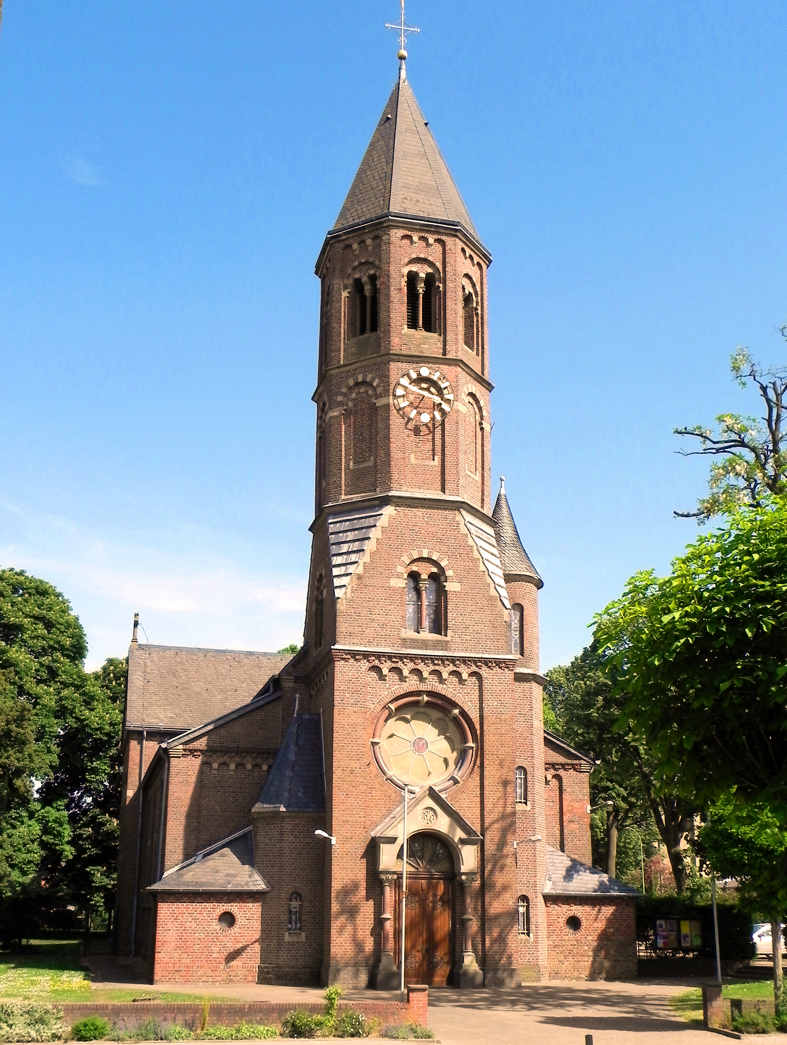 Pfarrkirche St. Martinus Wissersheim, Gemeinde Nörvenich (Nordrhein-Westfalen)